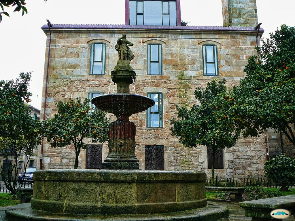 Pontevedra, Galiza. Praza do Peirao